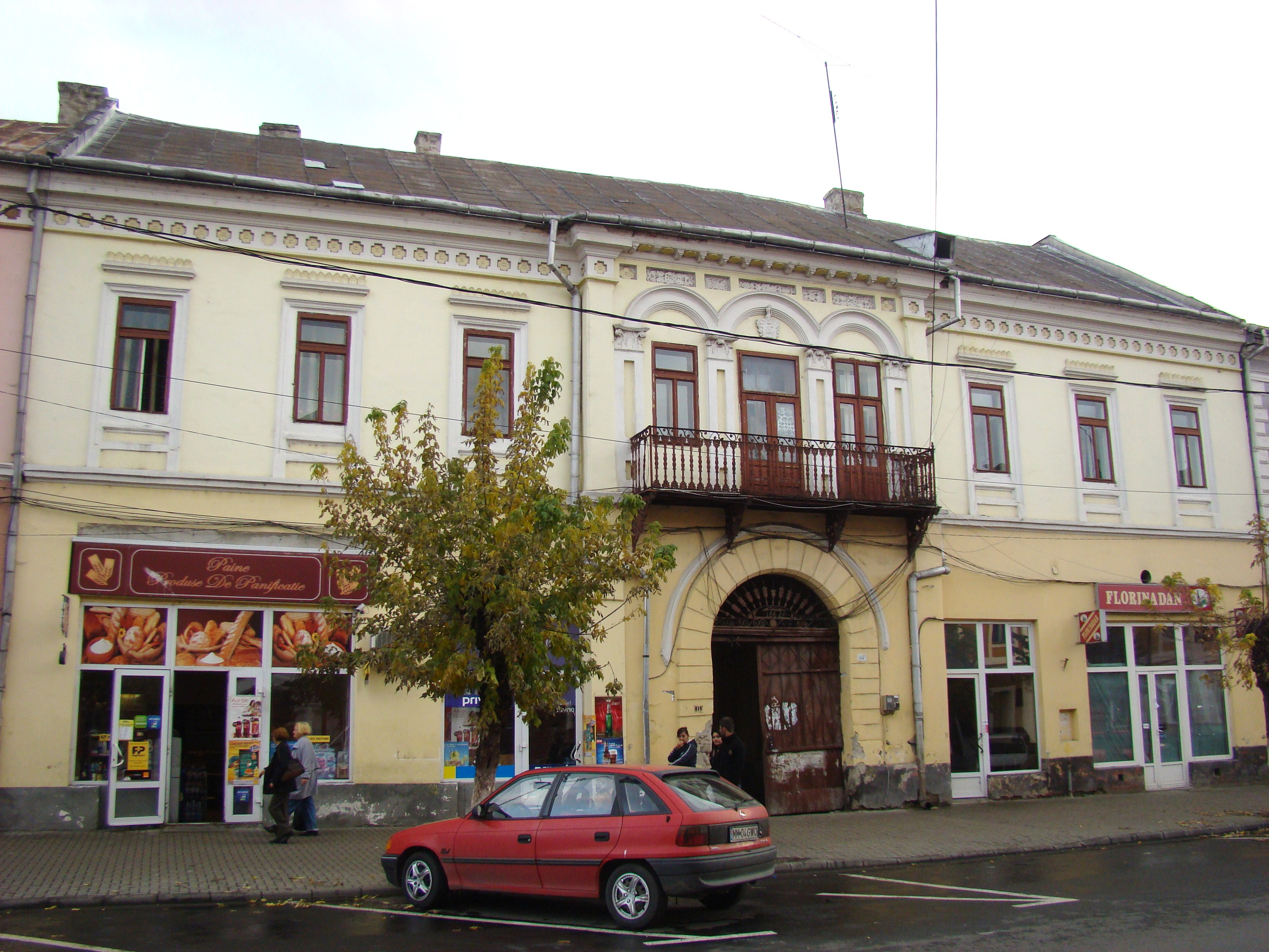 Casa Iurca, municipiul Sighetu Marmației, Str. Mihaly Ioan de Apșa 11